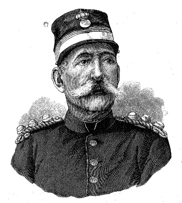 Λεωνίδας Πετροπουλάκης